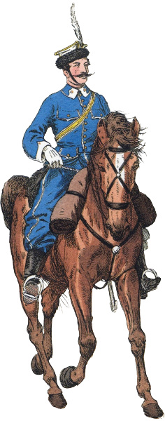 k.k. österreichisch-ungarische Krakusen